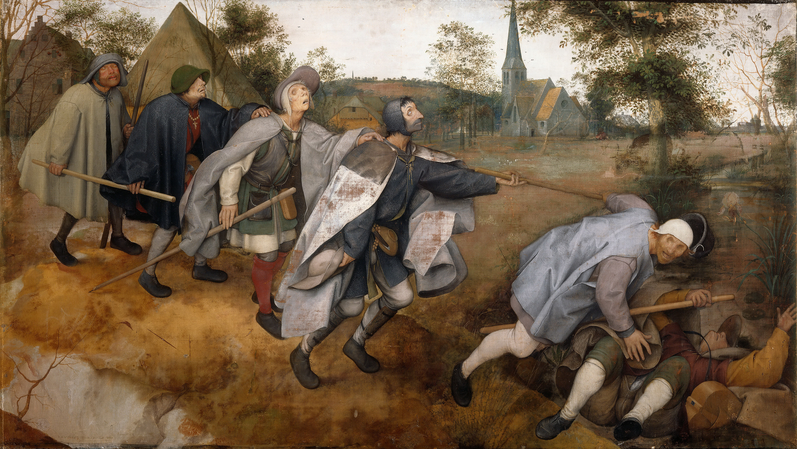 Питер Брейгель Старший Притча о слепых Дерево, масло. 1568